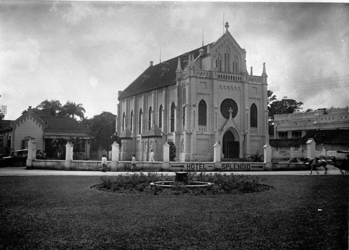 Foto. Kerk van het Heilig Hart te Malang.